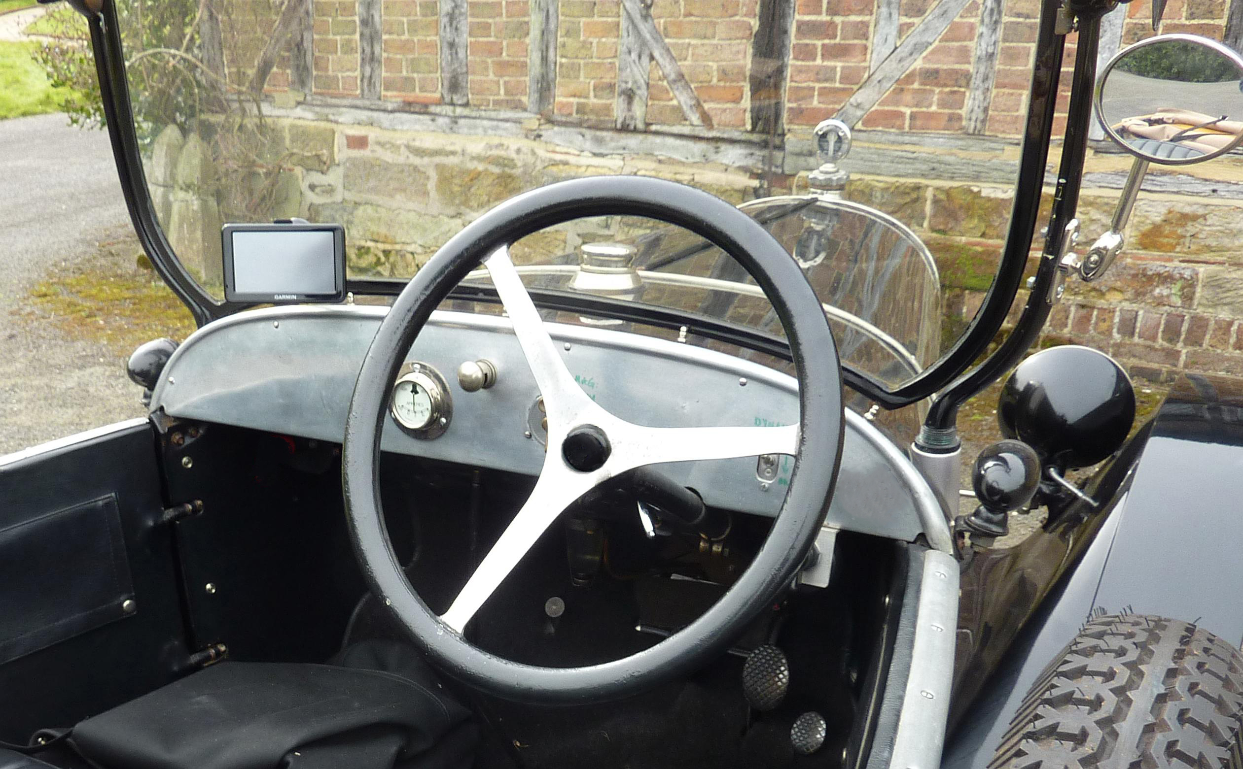 Tableau de bord de Citroen 5HP de 1922 ;seul instrument , l' amperemetre